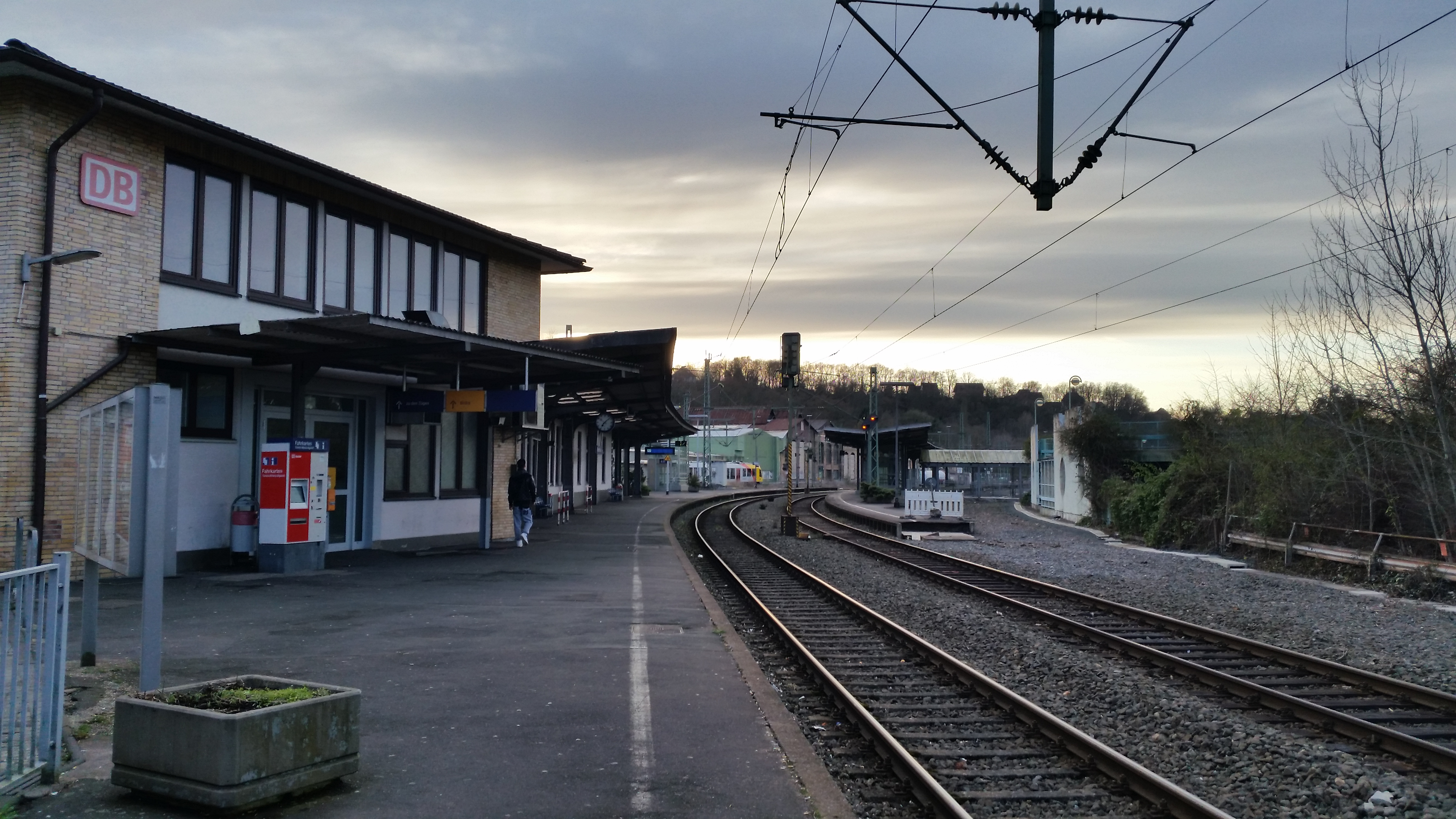 rechts sieht man das Kiesbett des ehemaligen Gleis 107, das Presseberichten zufolge im Jahr 2016, eigentlich schon im Jahr 2015, wieder hergestellt werden soll. Zum Leidwesen der erst vor wenigen Jahren errichteten direkten Fußgängerverbindung von der P+R-Anlage zum Gleis 106 (Richtung Köln)